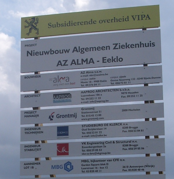 Infobord aan de bouwwerf AZ Alma - Eeklo - Oost-Vlaanderen - België